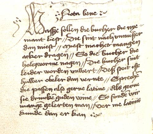 Deutsche Verse über die Nutzlosigkeit ungelesener Bücher aus Stadtbibliothek Mainz, Hs I 300, fol. 124 verso